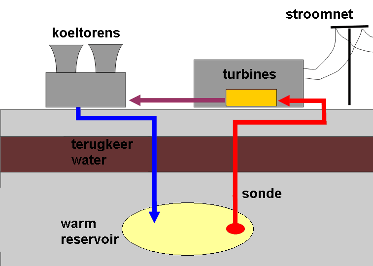 gebruik geothermie voor opwekken van elektriek. wiki du, GNU FDL, zelf vertaald.thumb|left|Originele Duitstalige versie